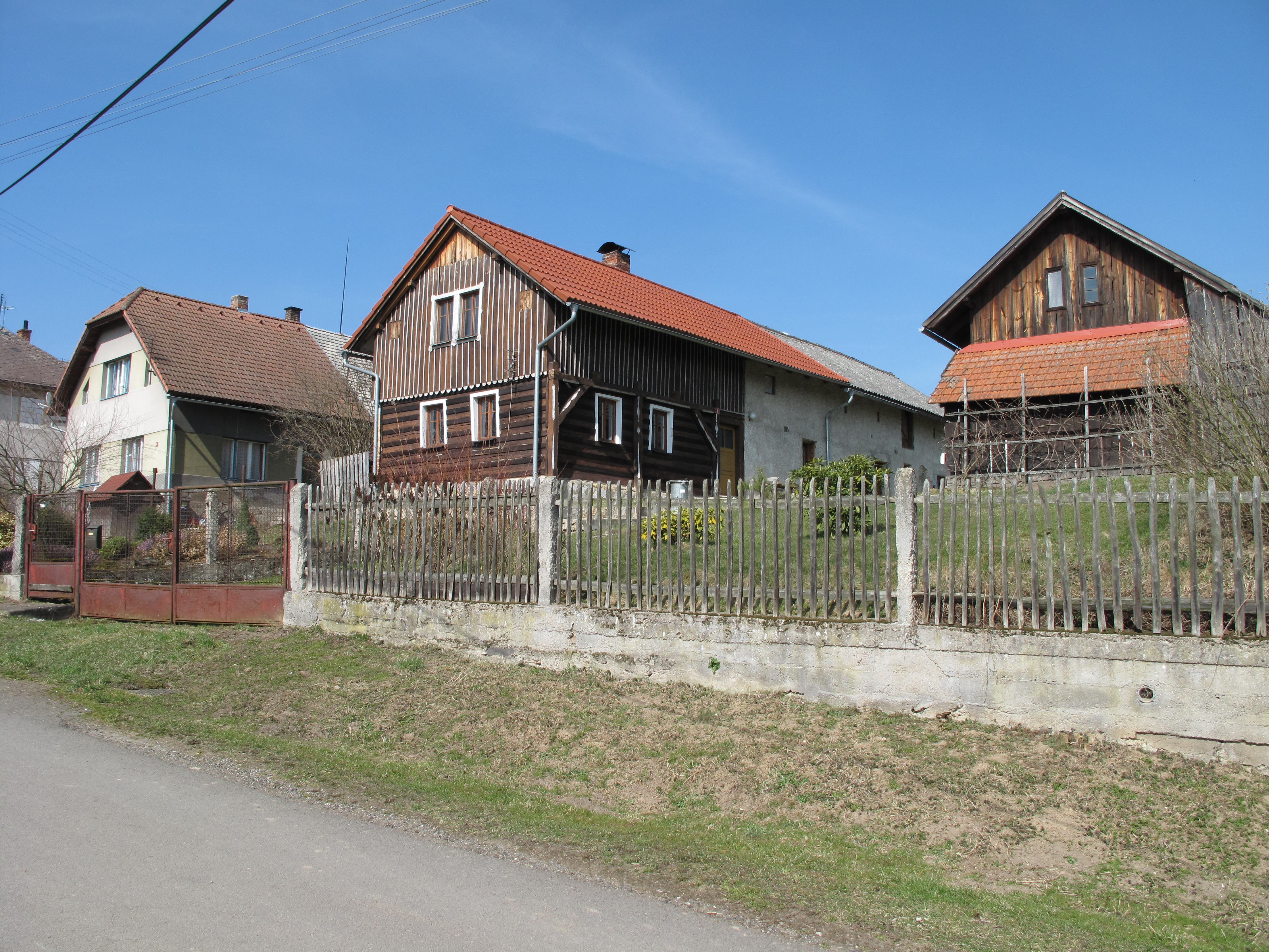 Domy v Chocnějovicích. Okres Mladá Boleslav, Česká republika.